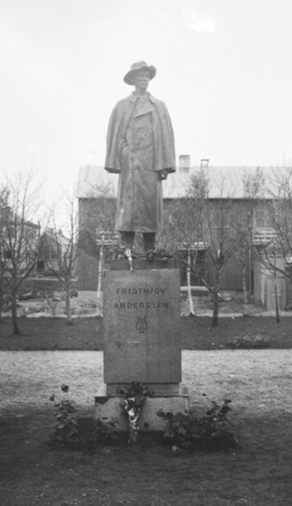 Statue av komponist Fridthjov Anderssen